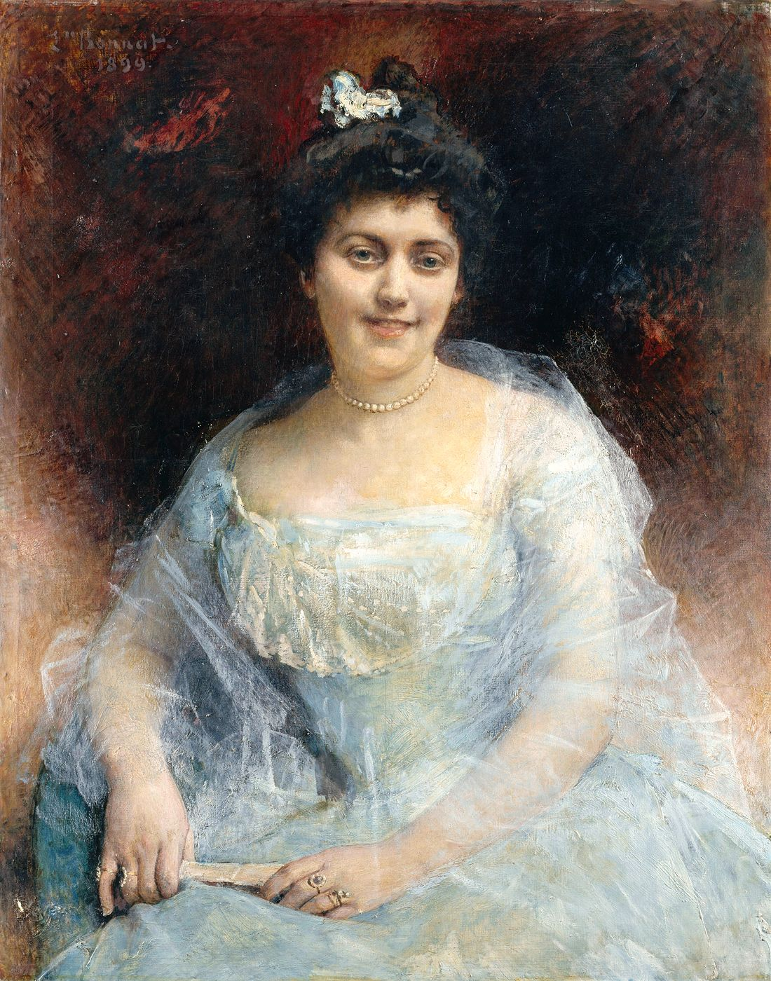 Ritratto di Marguerite Steinheil, olio su tela, 96 x 76 cm, Musée Bonnat, Bayonne